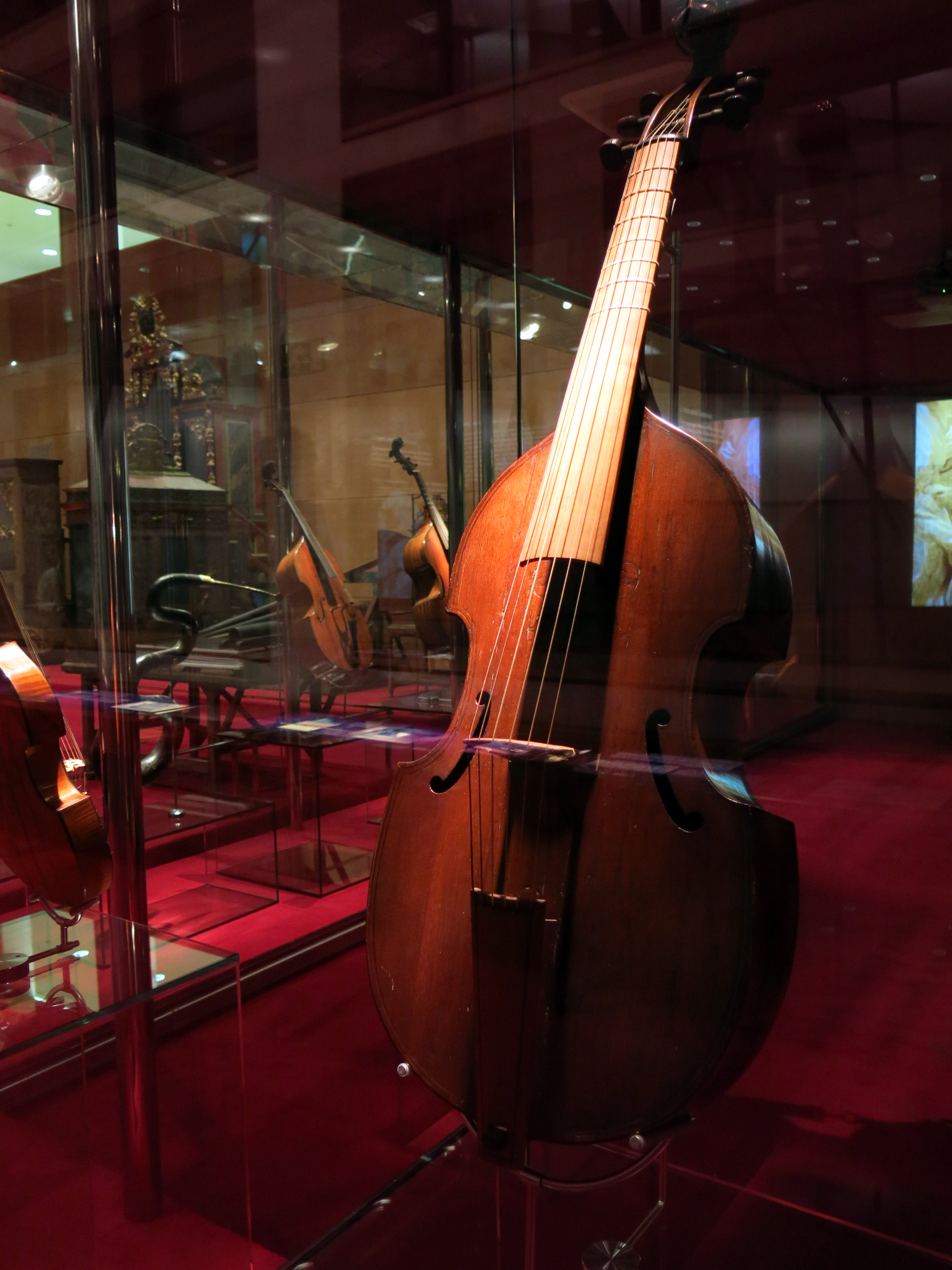 Viola d'arc baixa, viola da gamba. Norman, Barak. Londres. 1714. Museu de la Música de Barcelona. (MDMB 413